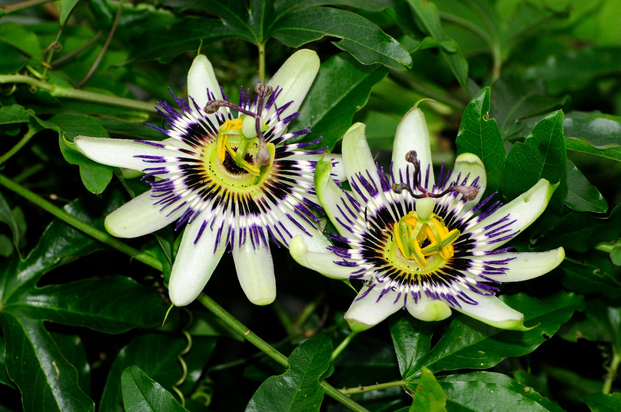 Mburucuyá o pasionaria. Passiflora caerulea.